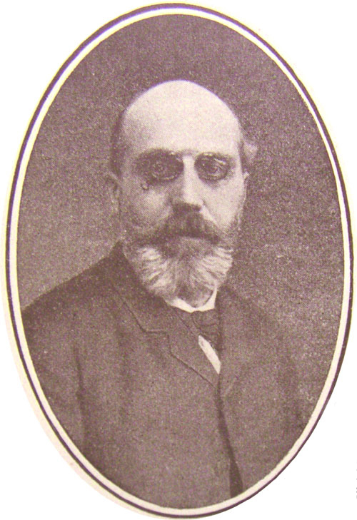 P. Stapfer en 1885 Source : P. Stapfer, V. Hugo à Guernesey (1905). Cliché Eric Chams (2006).